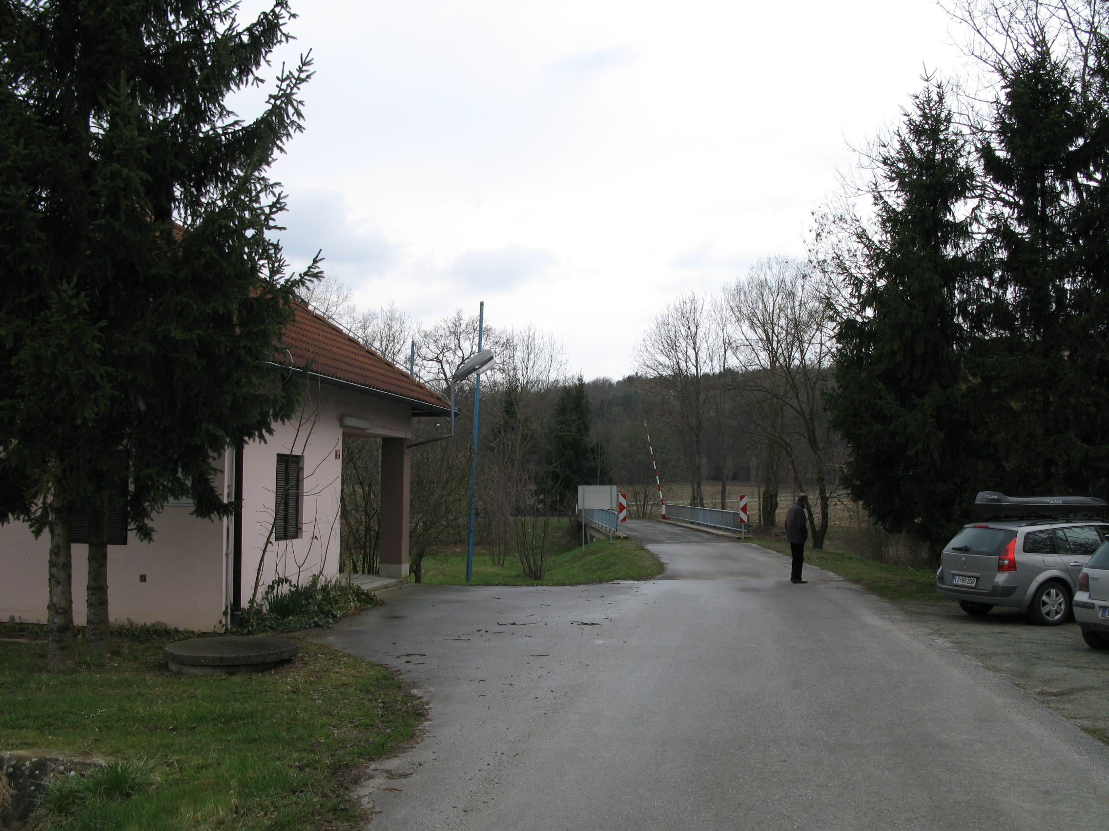 Most čez Kučnico na opuščenem mejnem prehodu za obmejni promet Slovenija-Avstrija